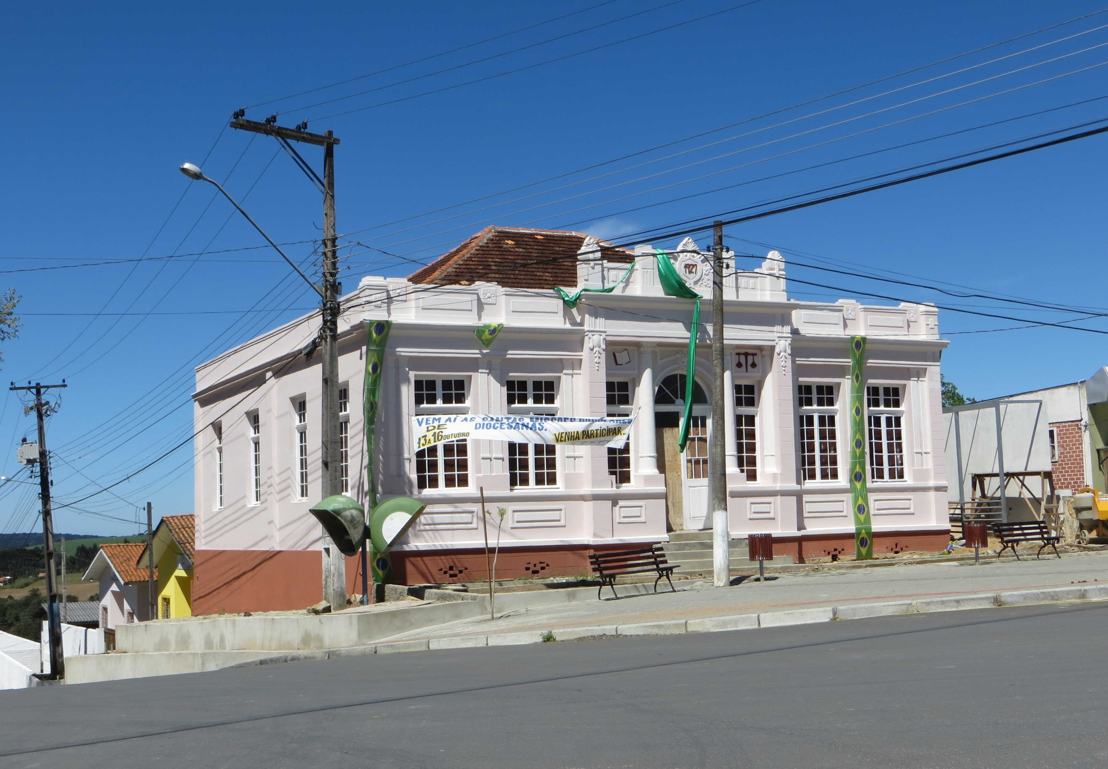 Sede histórica da antiga Prefeitura Municipal, construída em 1927, em São João do Triunfo, estado brasileiro do Paraná, região Sul do país.